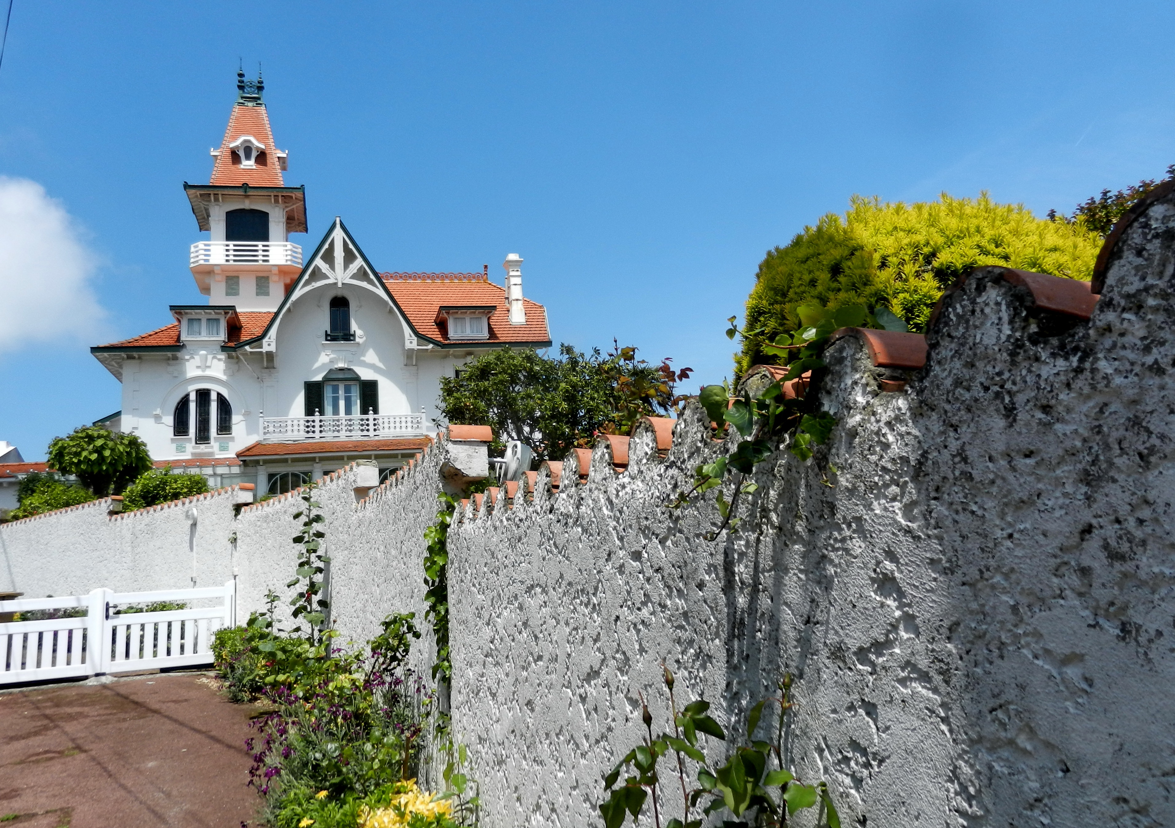 Arcachon